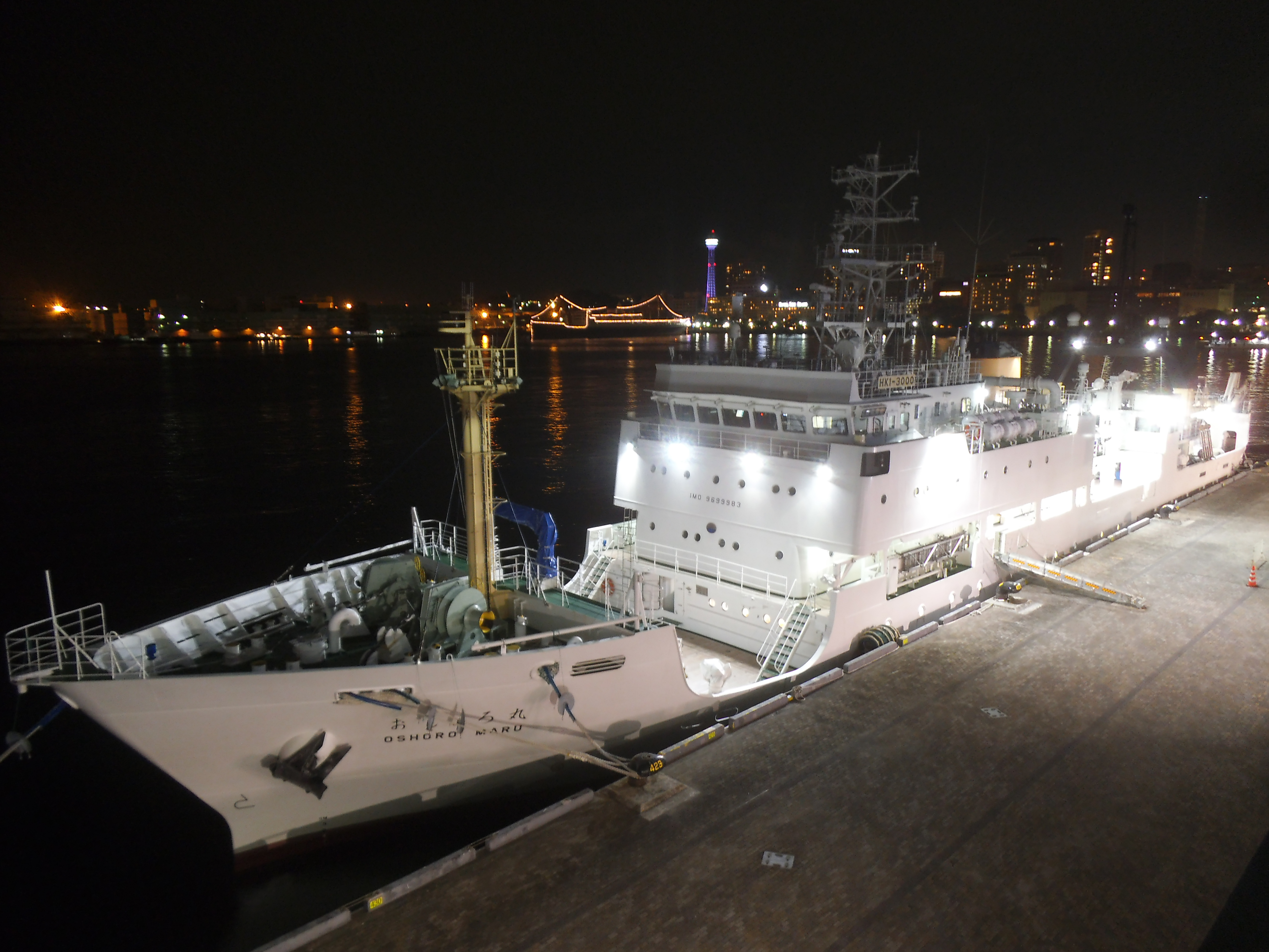 北海道大学水産学部の練習船兼海洋調査船おしょろ丸(5代目）、横浜港にて